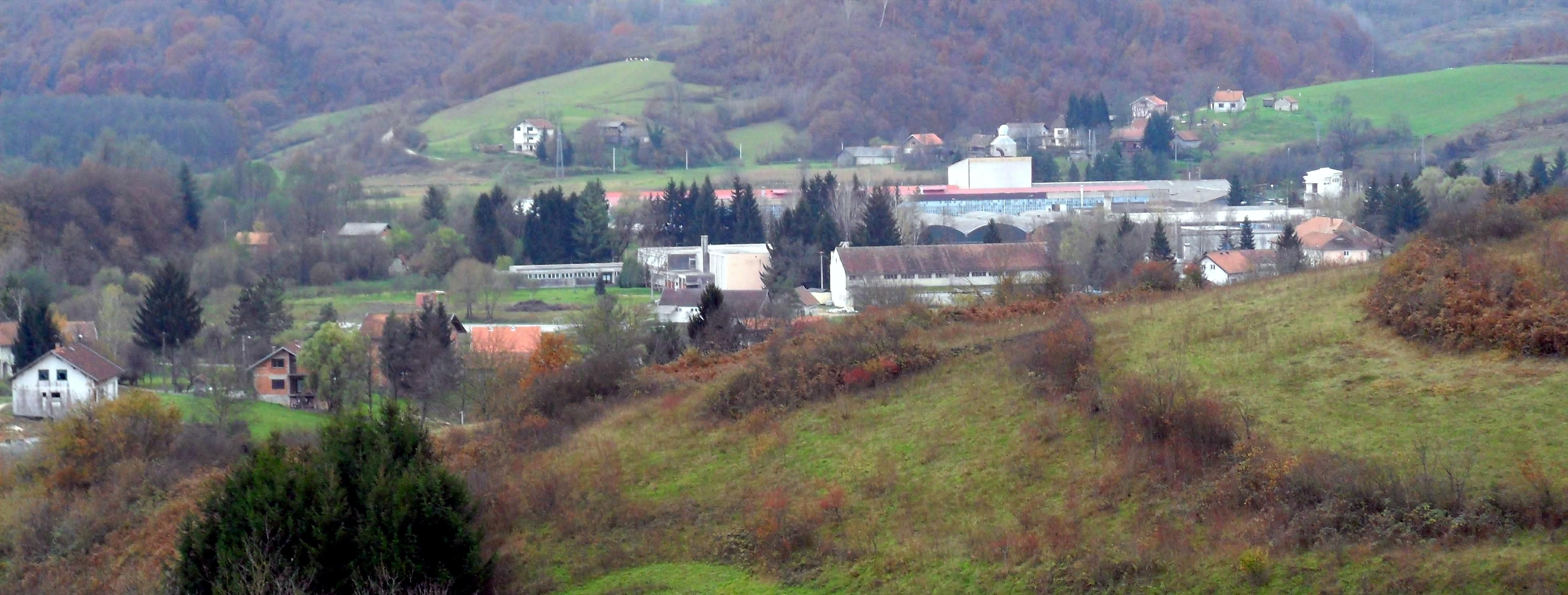 31.10.2010. _ Vojnić